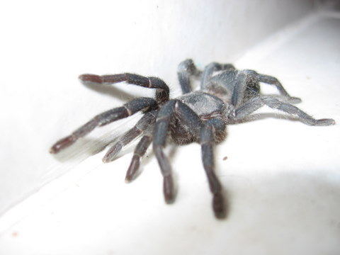 Chaetopelma aegyptiaca